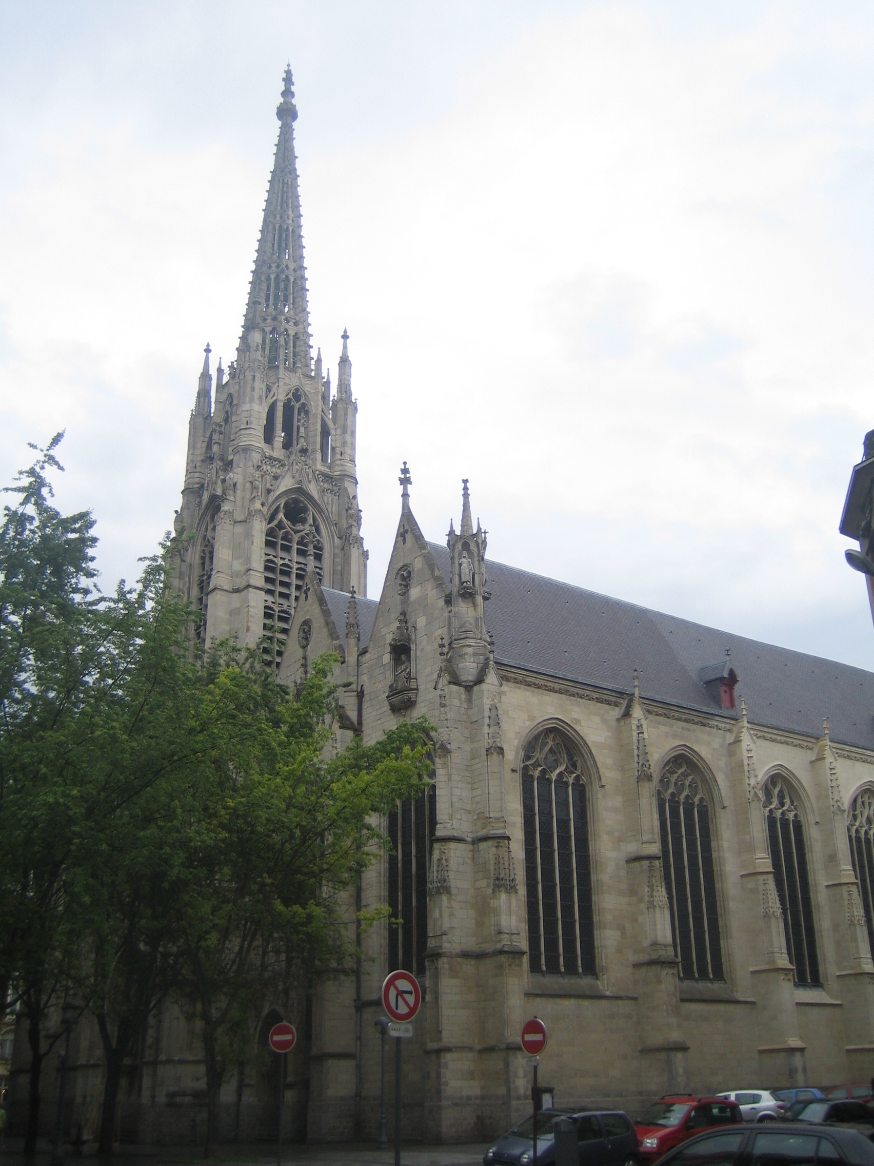 Eglise Saint-Maurice, Lille